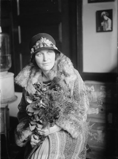 Stefi Geyer (1888 - 1956), Hungarian violinist